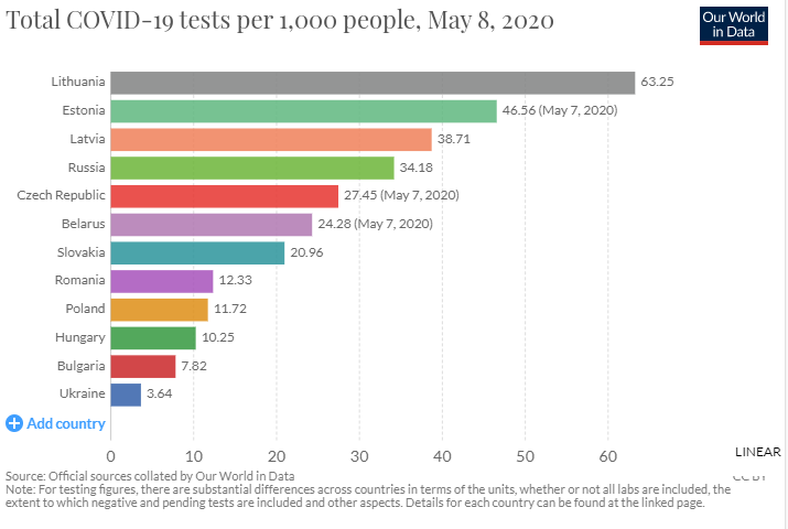 Діаграма: Кількість проведених ПЛР-тестів із розрахунку на 1000 населення, що проведені в Україні станом на 8 травня 2020 року у порівнянні з країнами-сусідами . Джерело даних: Open World in Data